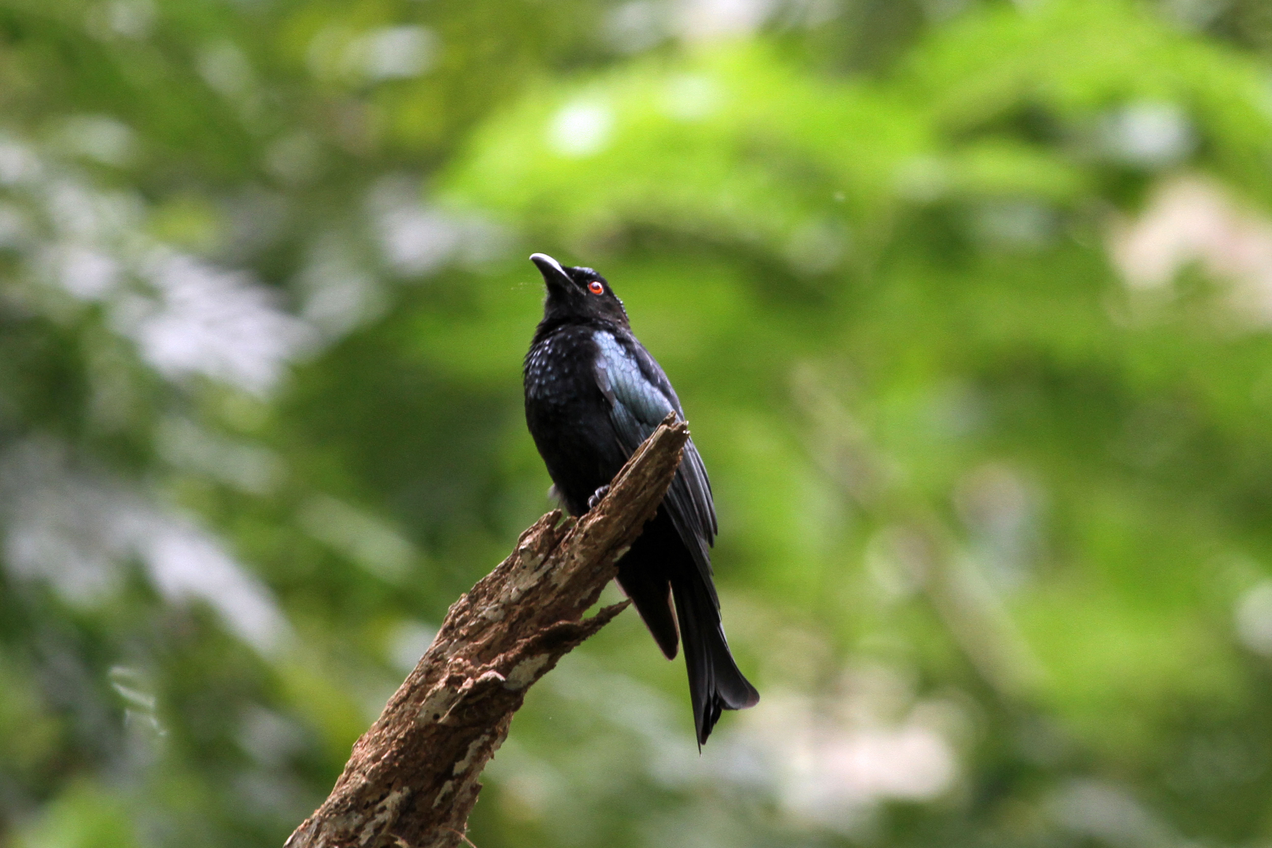 Spangled Drongo